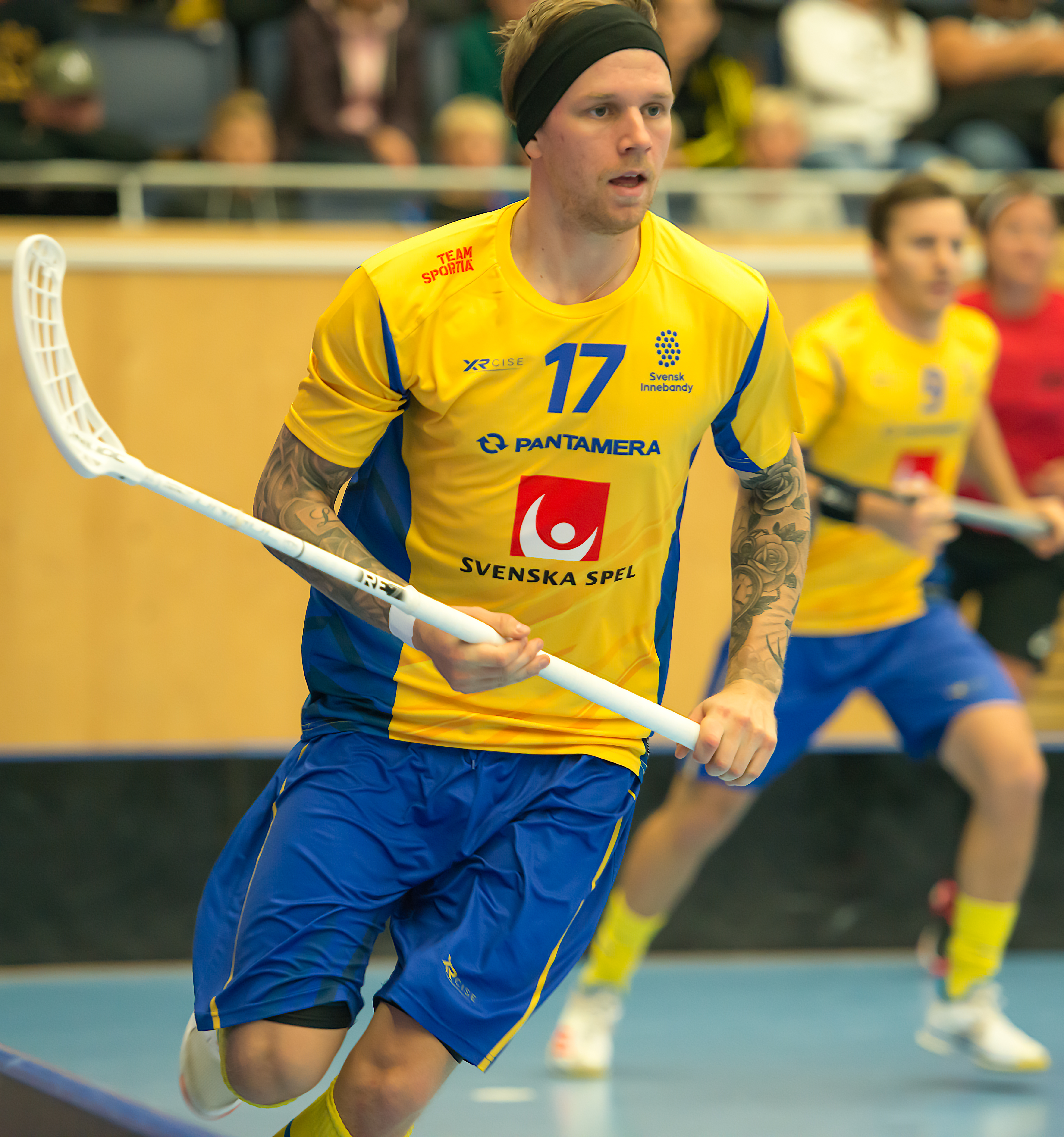 Sweden vs Finland